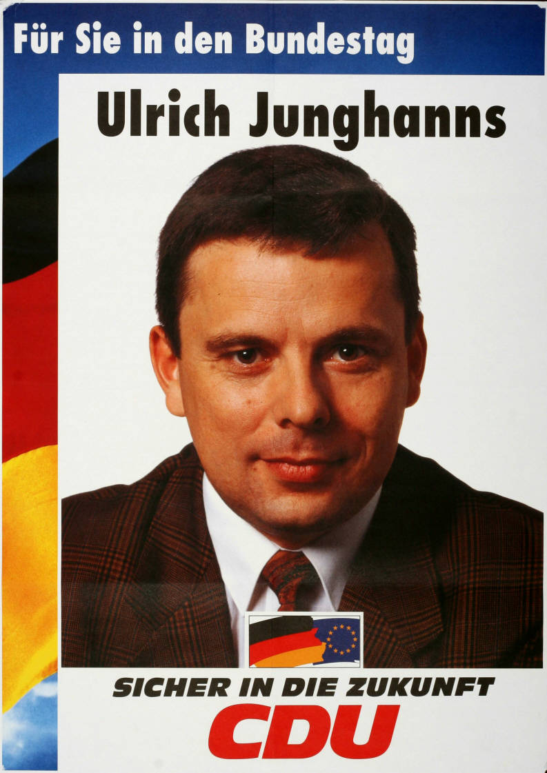 Für Sie in den Bundestag Ulrich Junghanns Sicher in die Zukunft CDUAbbildung:Porträtfoto - NationalfarbenPlakatart:Kandidaten-/Personenplakat mit PorträtObjekt-Signatur:10-001: 4041Bestand:Plakate zu Bundestagswahlen (10-001)GliederungBestand10-18:Plakate zu Bundestagswahlen (10-001) » Die 13. Bundestagswahl am 16. Oktober 1994 » CDU » Mit PorträtfotoLizenz:KAS/ACDP 10-001: 4041 CC-BY-SA 3.0 DE